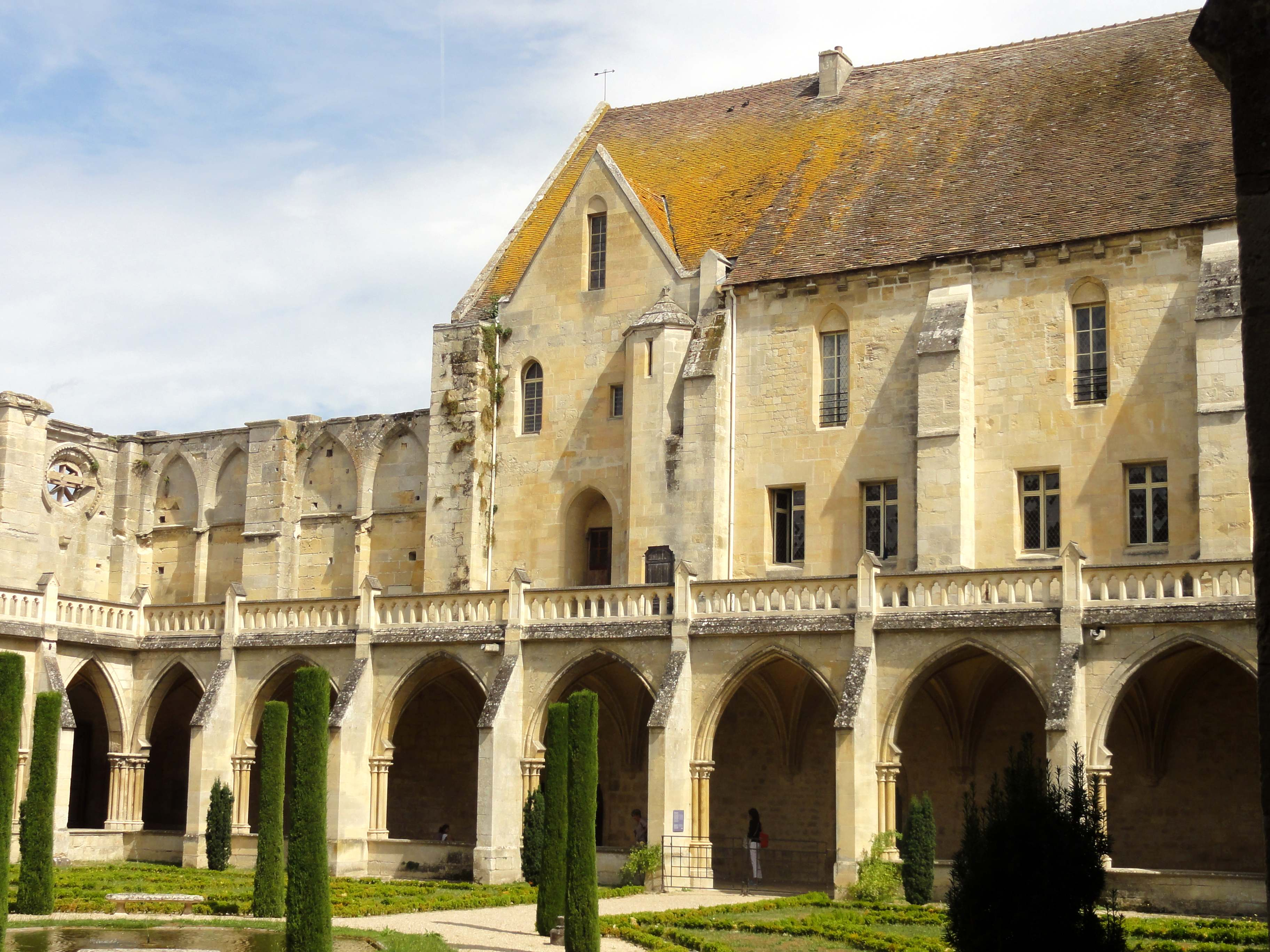 Cloître - voir titre.